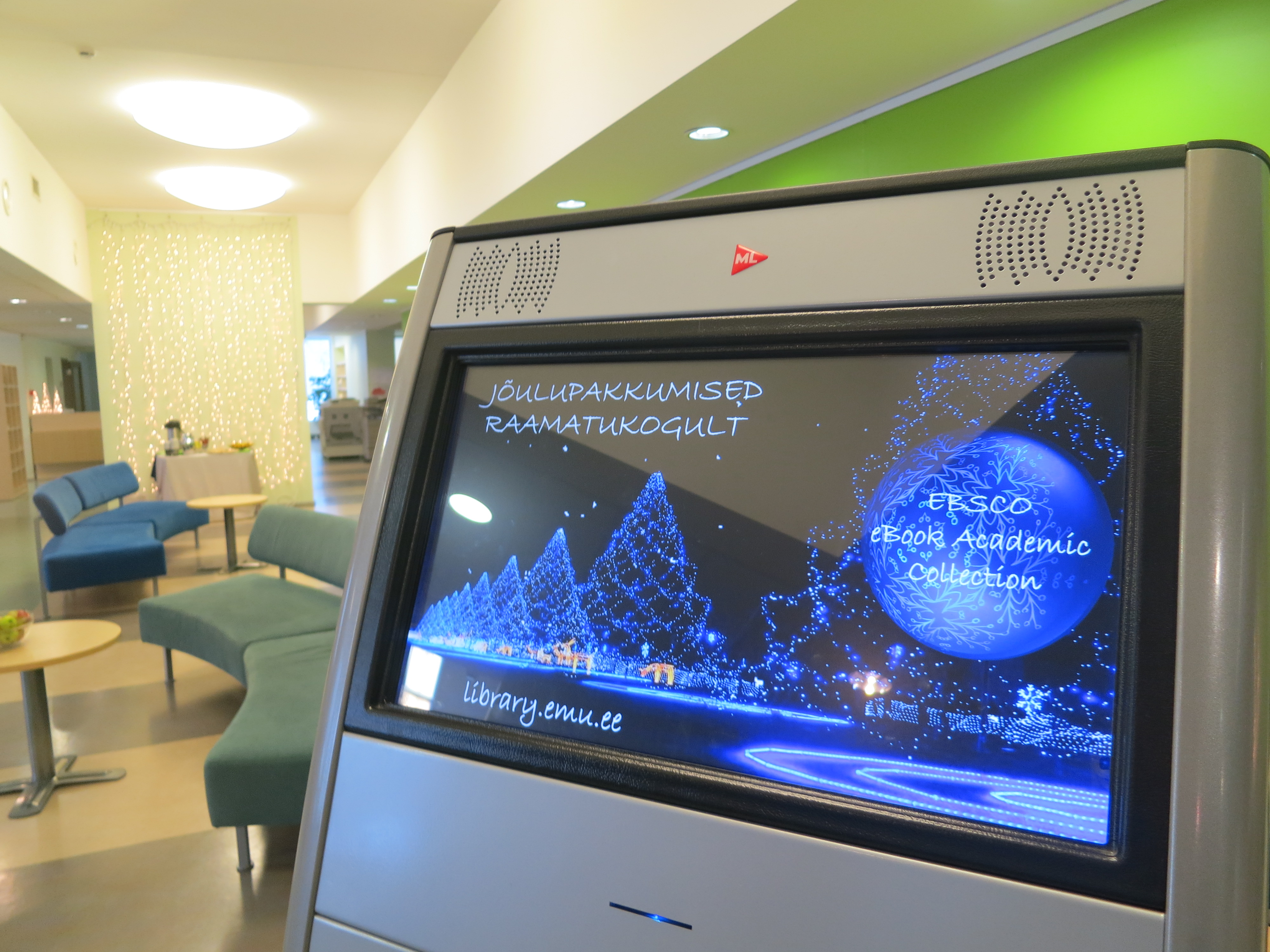 e-raamatute reklaam raamatukogus